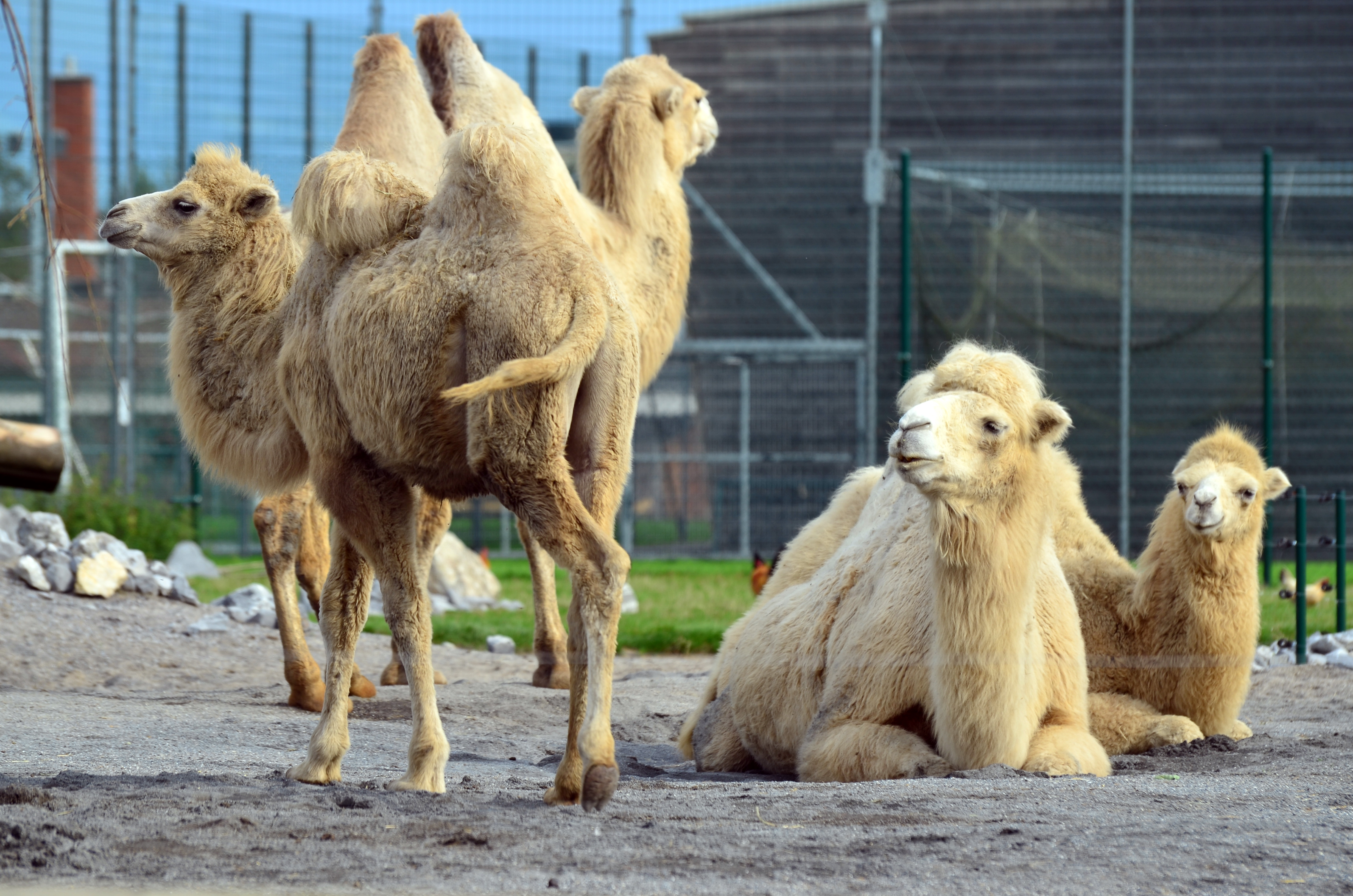 Knie's Kinderzoo in Rapperswil (Switzerland)